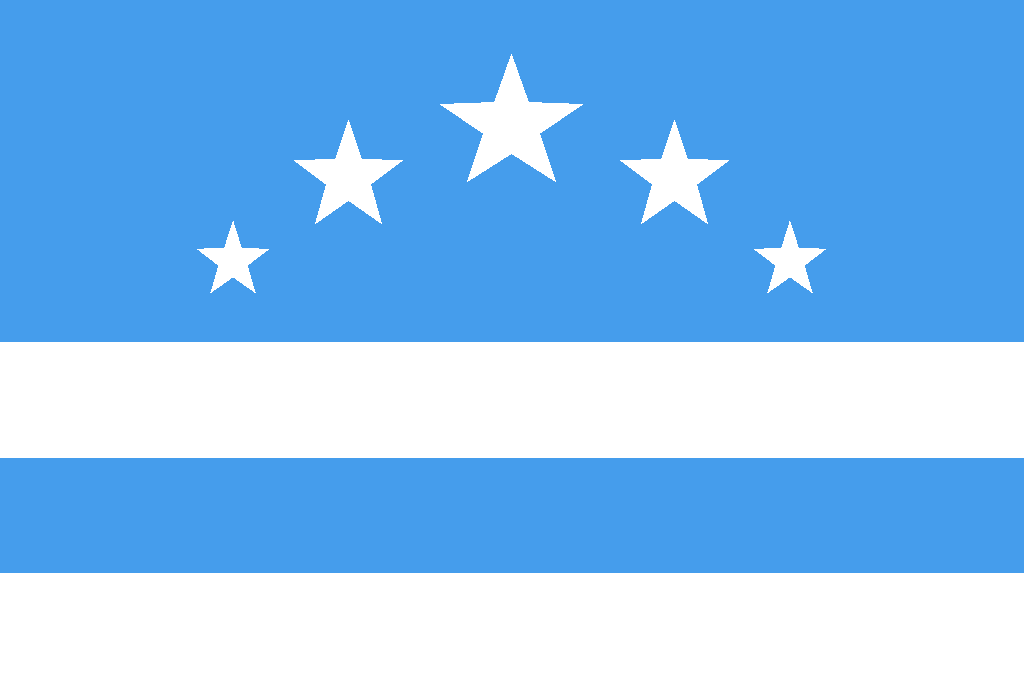 Bandera de Palora